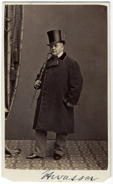 Hovkamreraren och teaterchefen Daniel Hwasser.